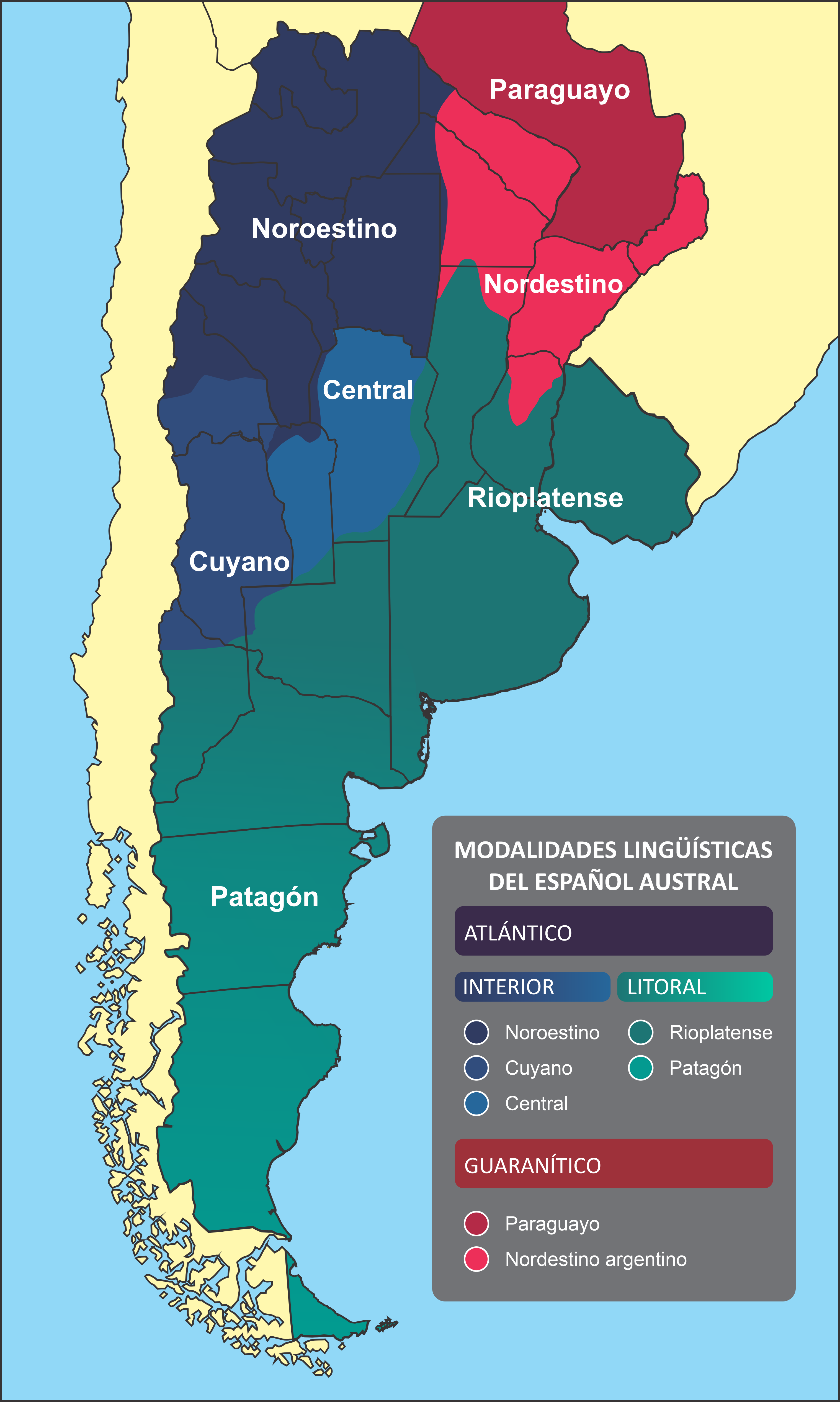 Modalidades lingüísticas del español austral según el dialectólogo y sociolingüista Francisco Moreno Fernández.